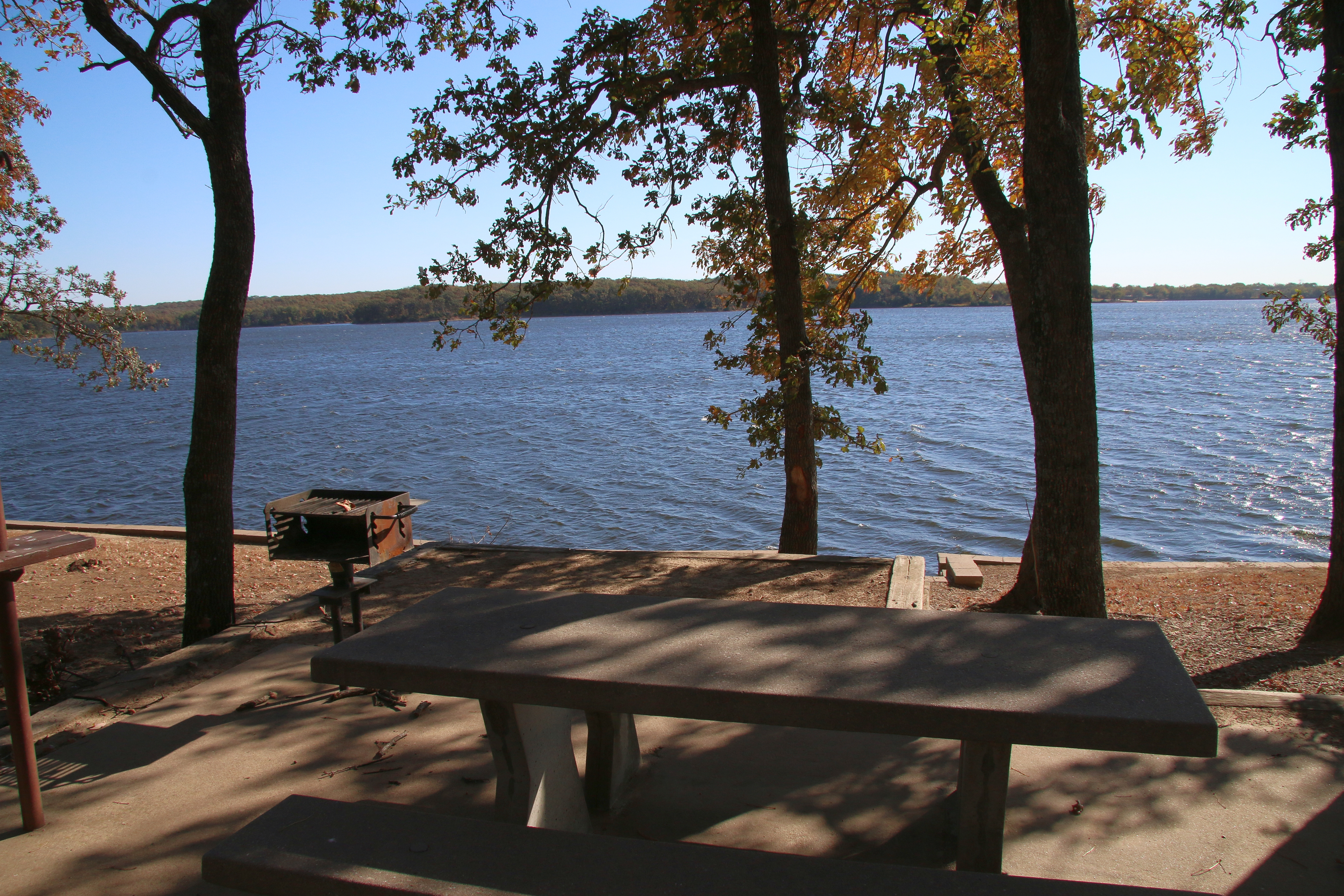 Big Hill Lake, Labette County, Kansas.